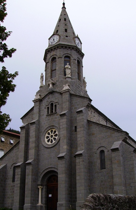 Eglise de Chanéac, Ardèche, France. Photo prise par Arnaud-Victor Monteux (juillet 2006)